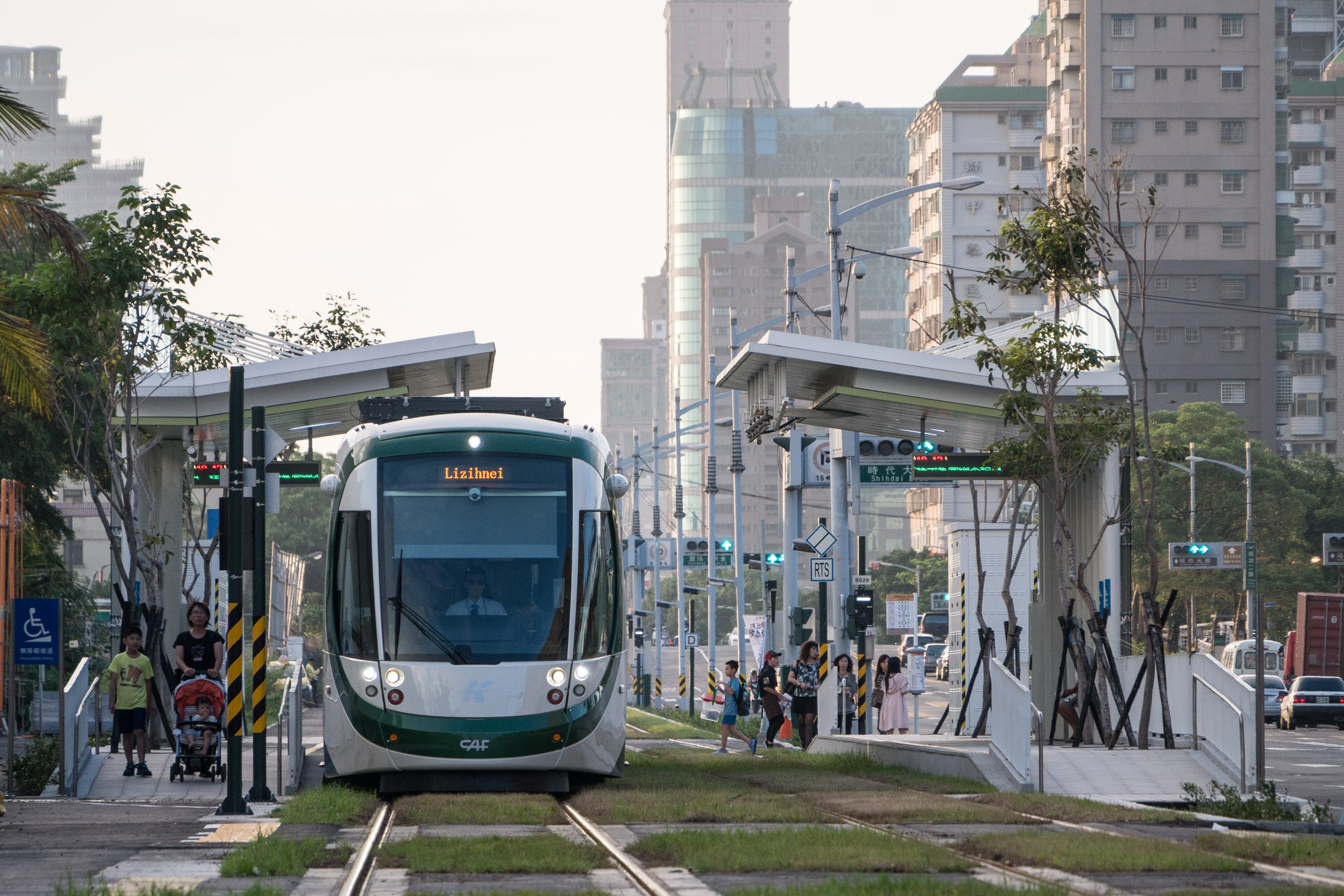 夢時代車站